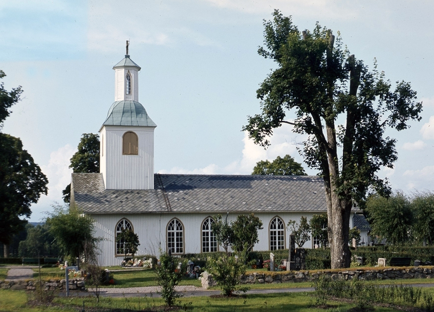 Mo kyrka, Dalsland